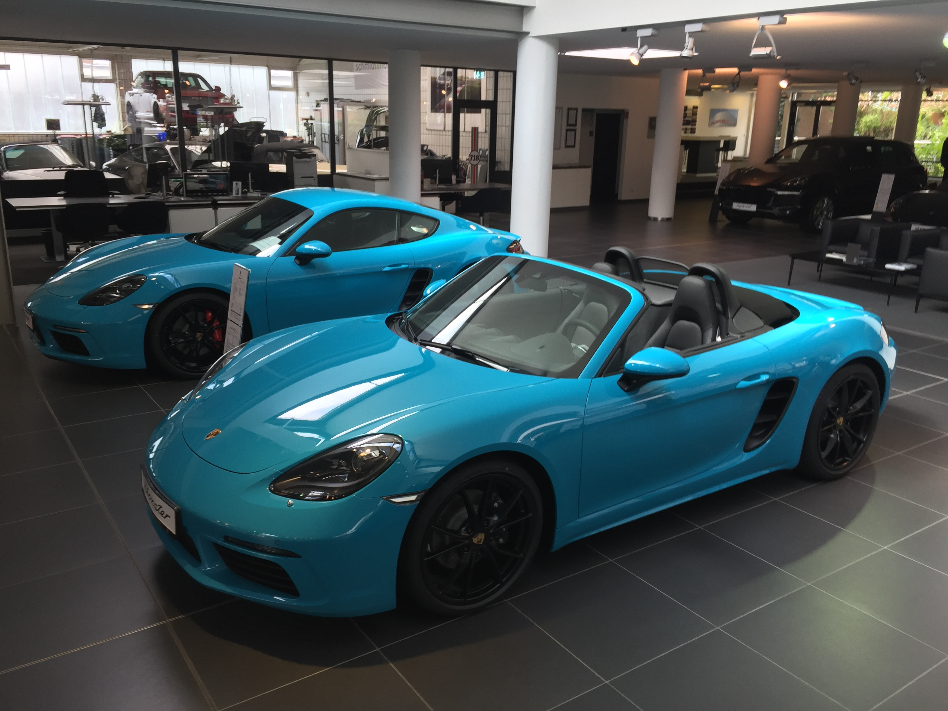 Porsche 718 Cayman und Boxster